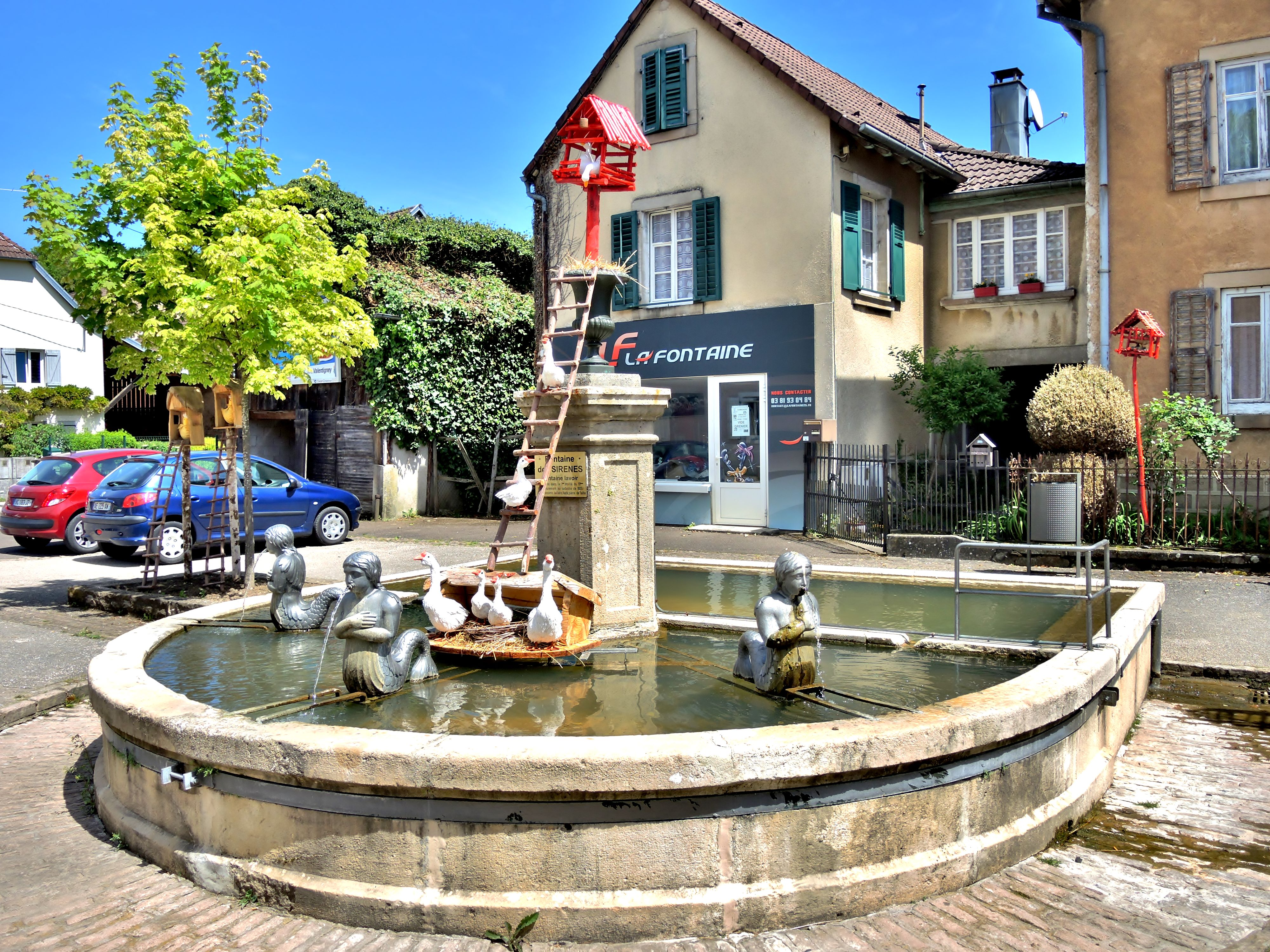 Fontaine aux sirènes, à Allenjoie. Doubs